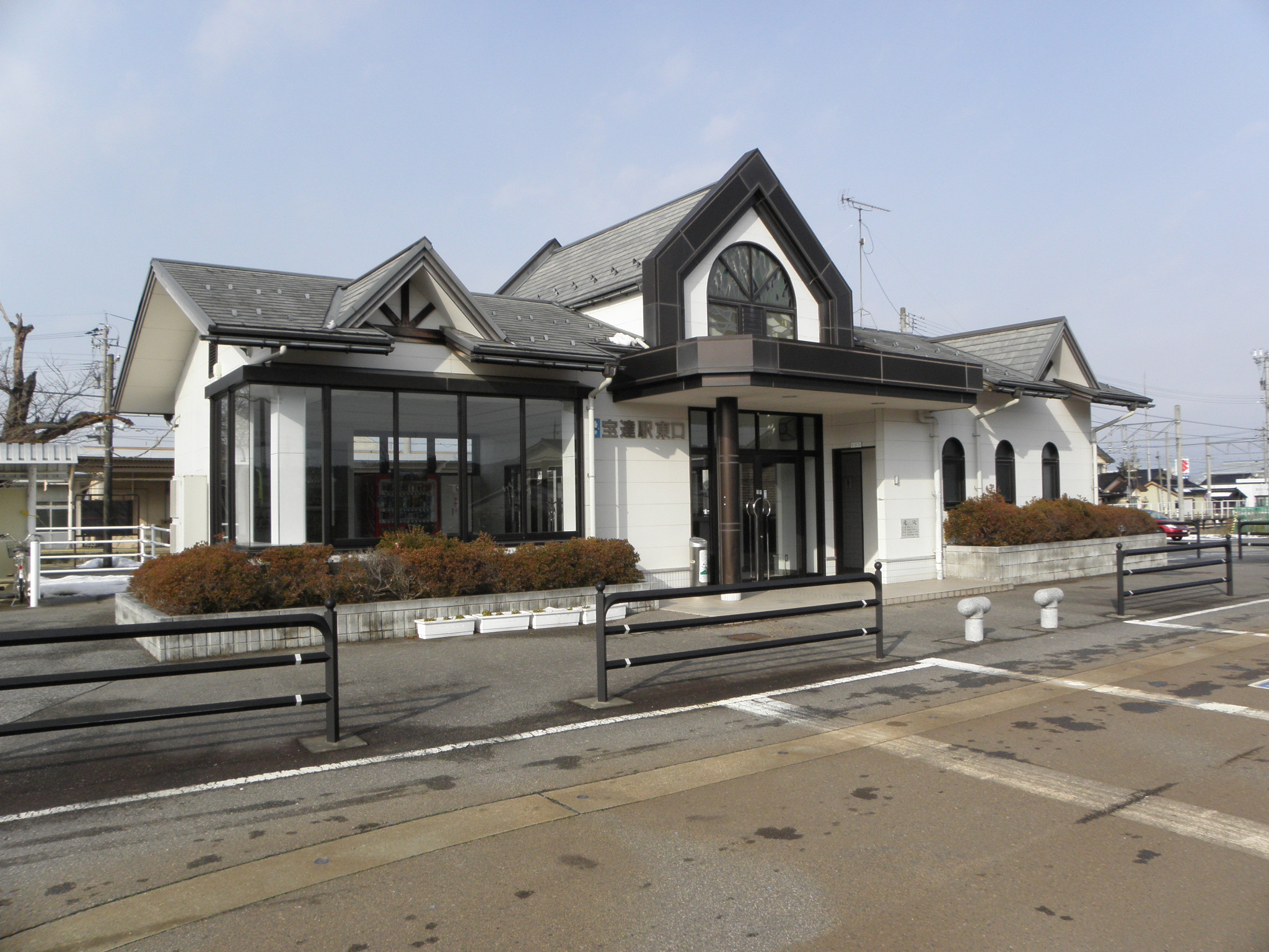 宝達駅 東口正面